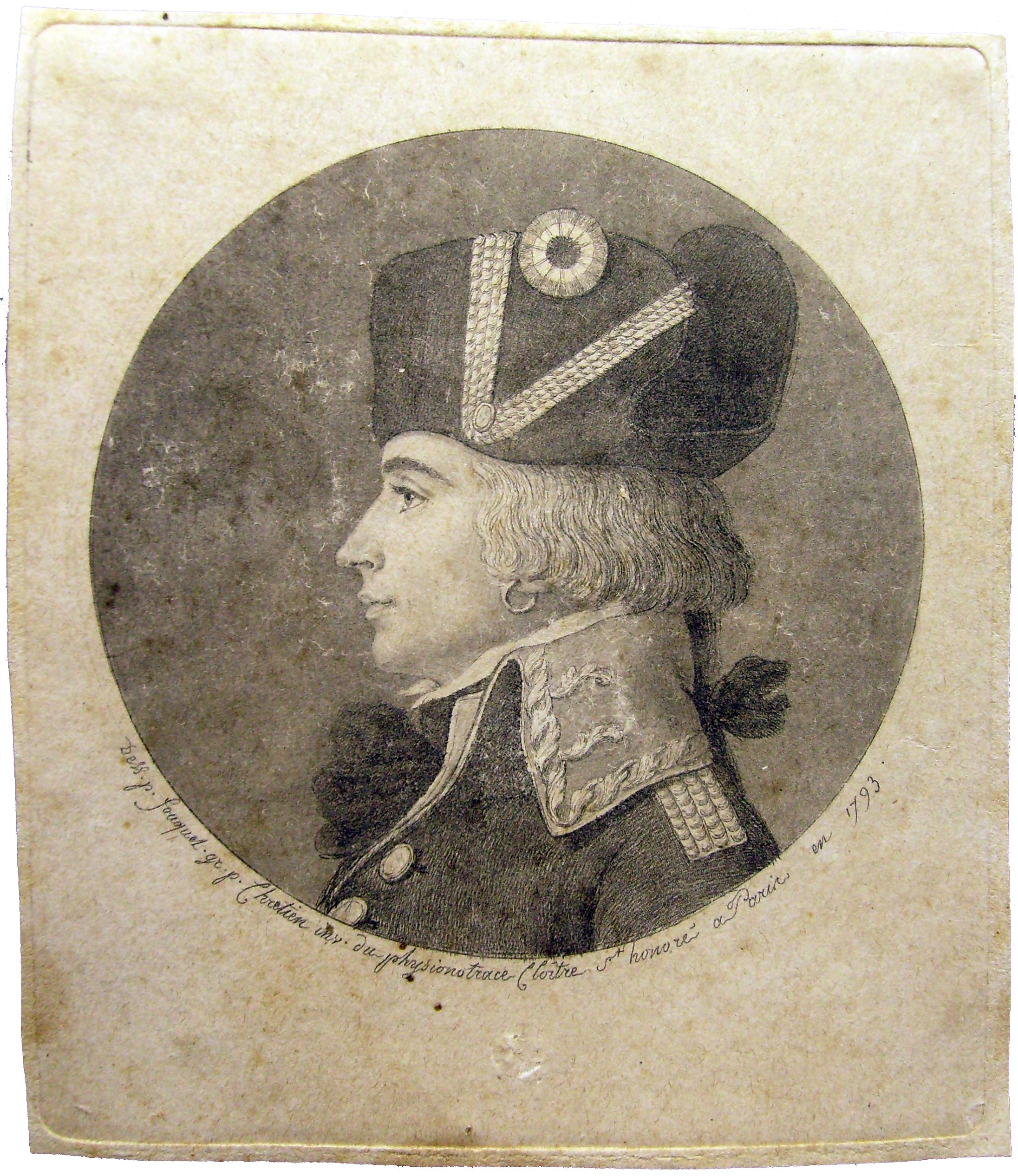 Physionotrace dessiné par Jean Fouquet et gravé par Gilles-Louis Chrétien, 1793.